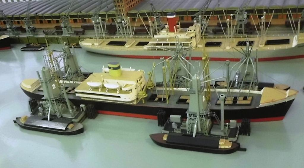 Getreideheber im Einsatz